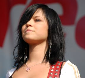 Triinu Kivilaan live (Koblenz, august 2005)